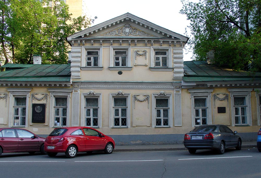 27, Sivtsev Vrazhek Street, Moscow - Alexander Herzen House